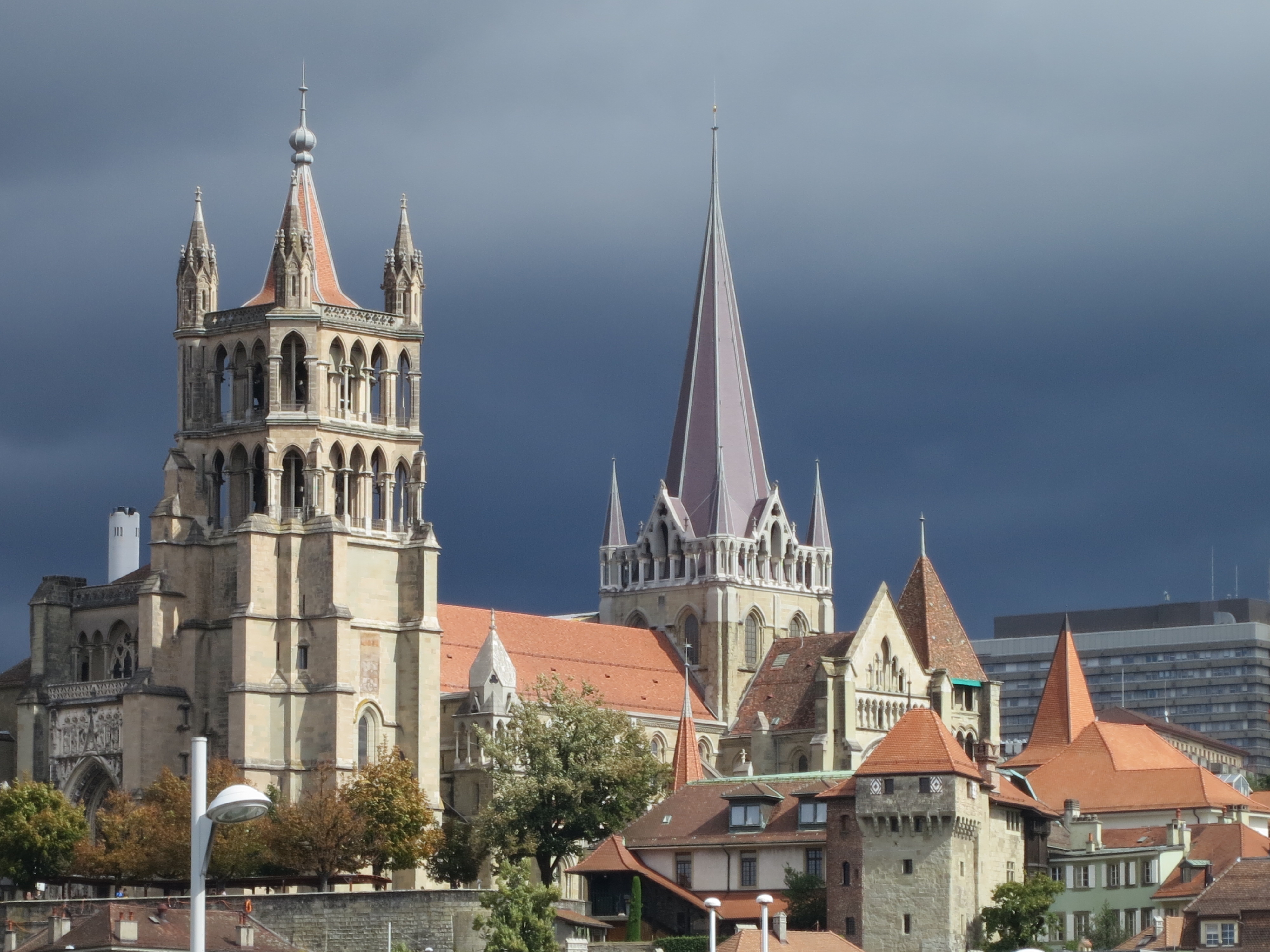 Kathedrale Notre-Dame